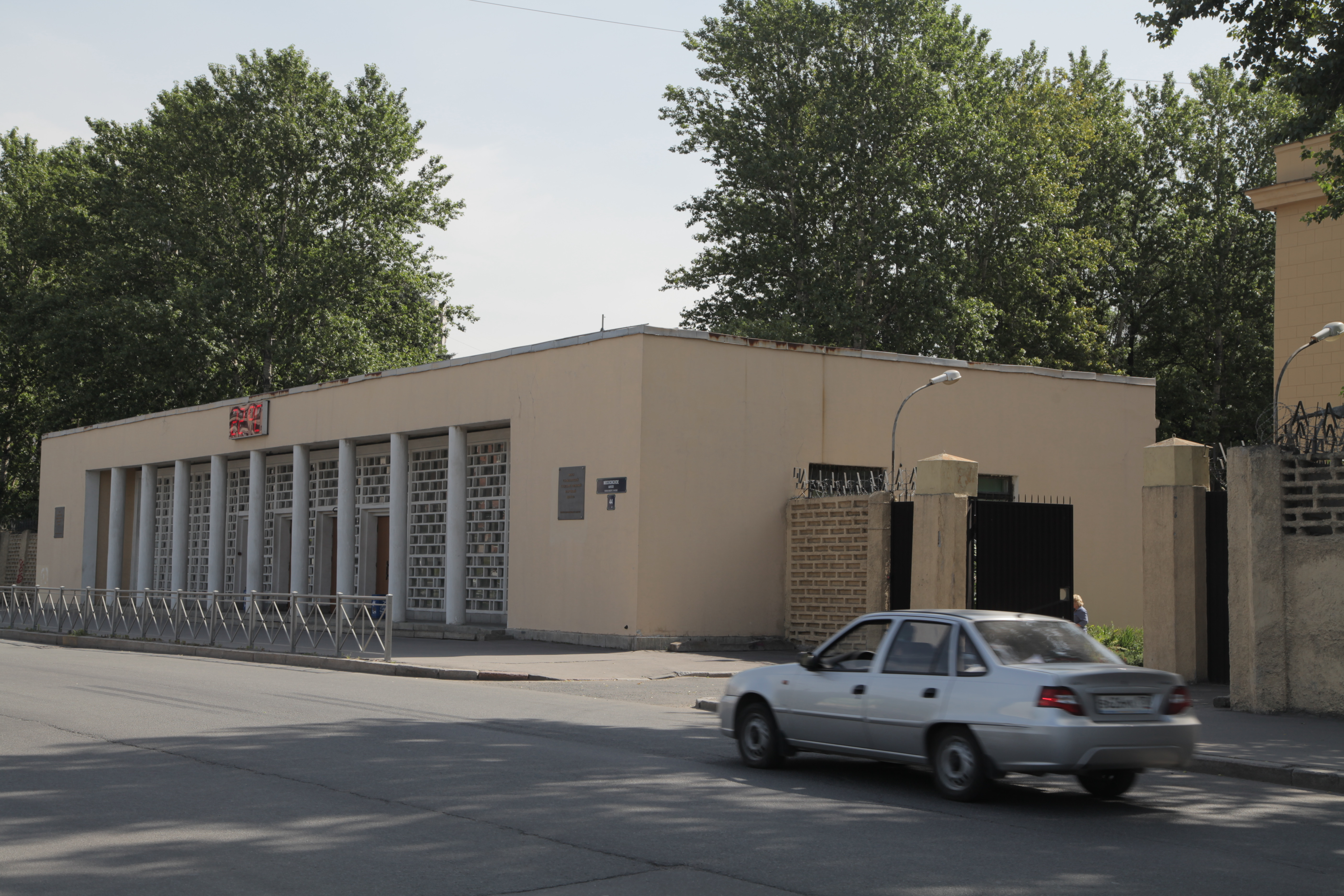 Крыловский научный центр